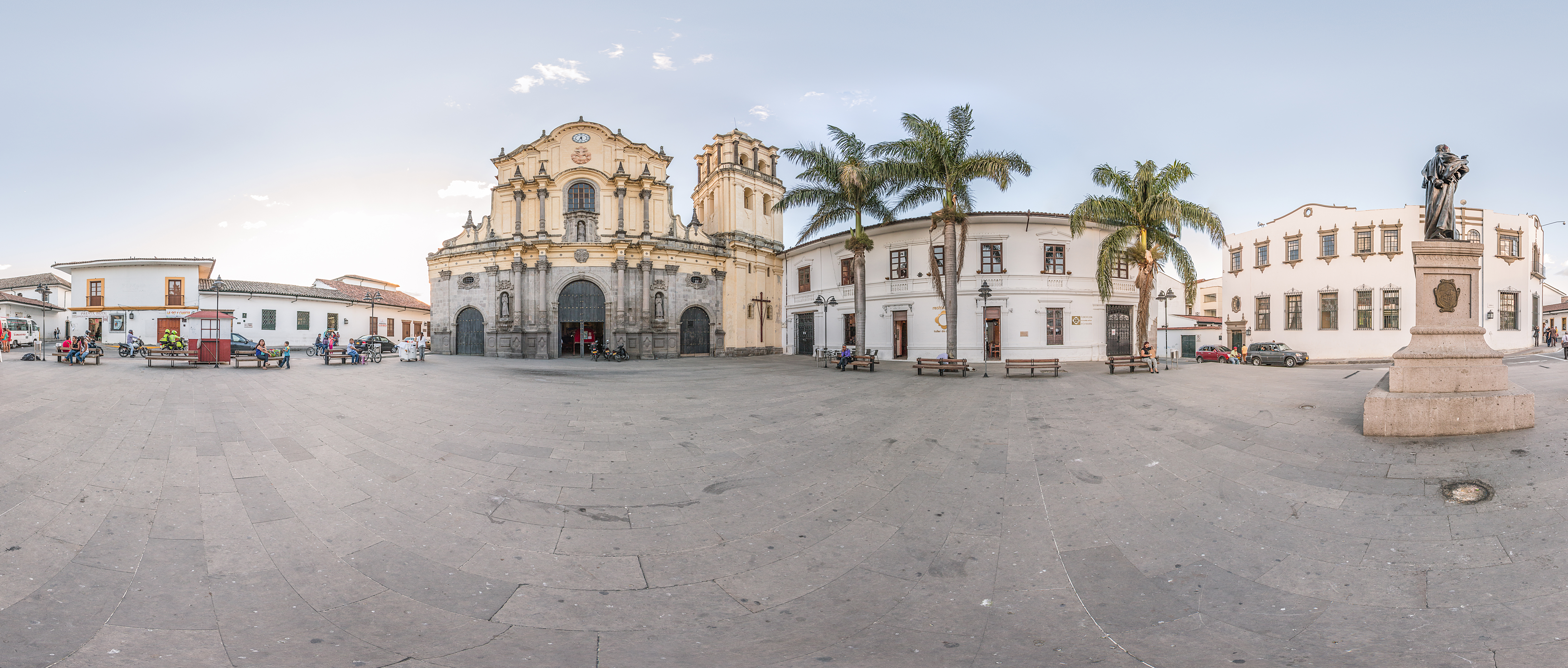 Panorámica de la iglesia de San Francisco en la Ciudad de Popayán Colombia Esta fotografía fue tomada en el municipio colombiano con código 19001.